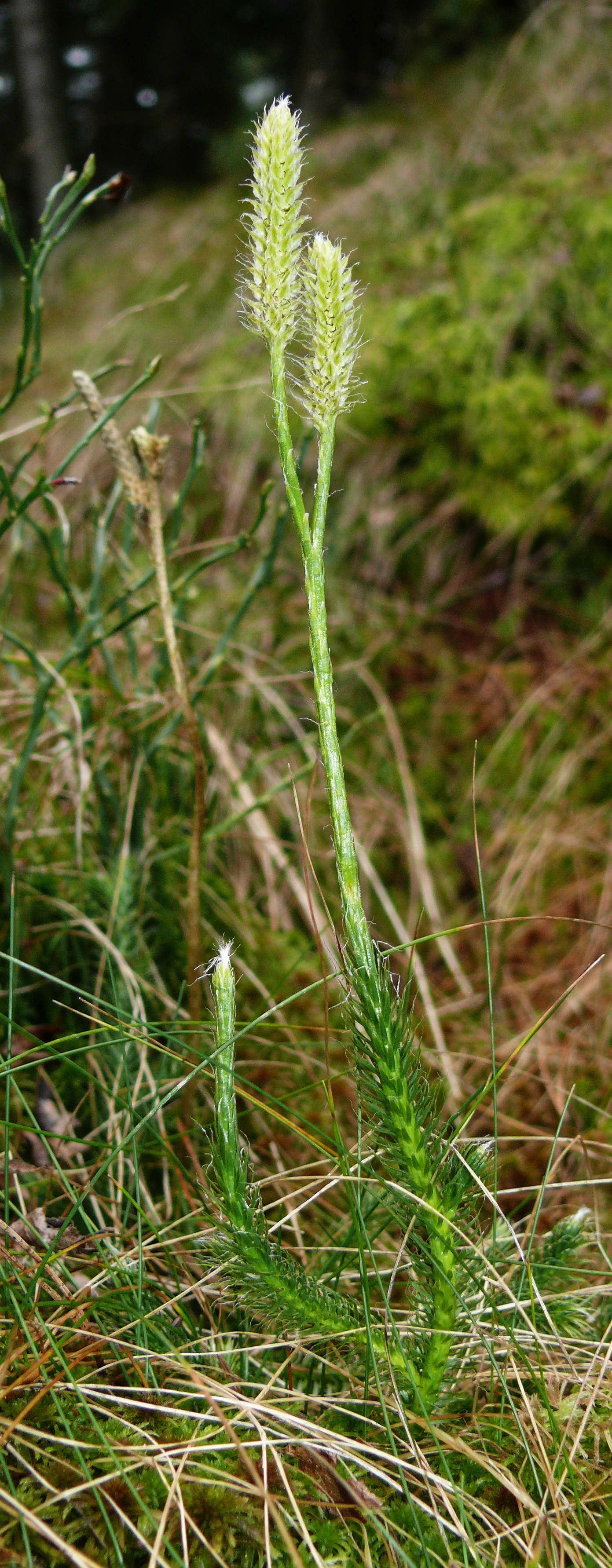 Lycopodium clavatum, Schwäbisch-Fränkische Waldberge, Germany